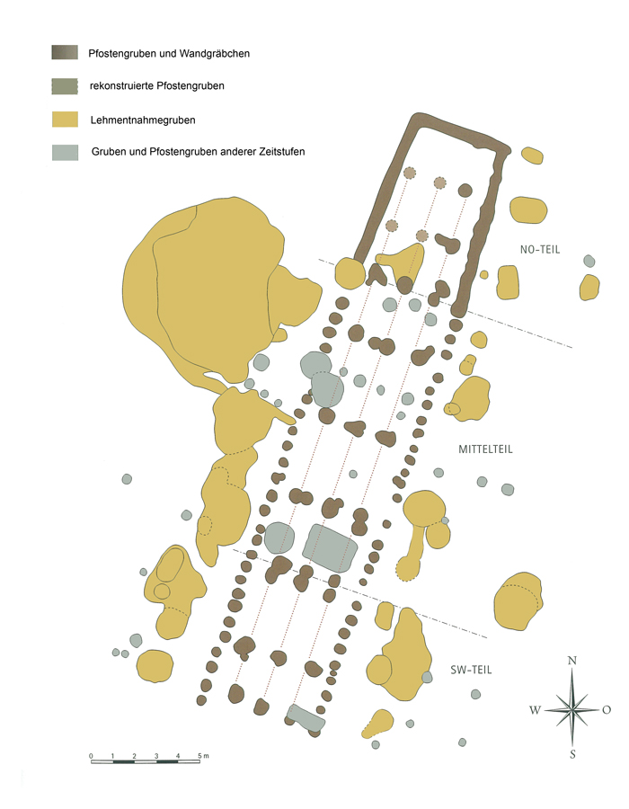 Linearbandkeramischer Hausgrundriss aus Rannersdorf, archäologische Großgrabung 2001/2002.